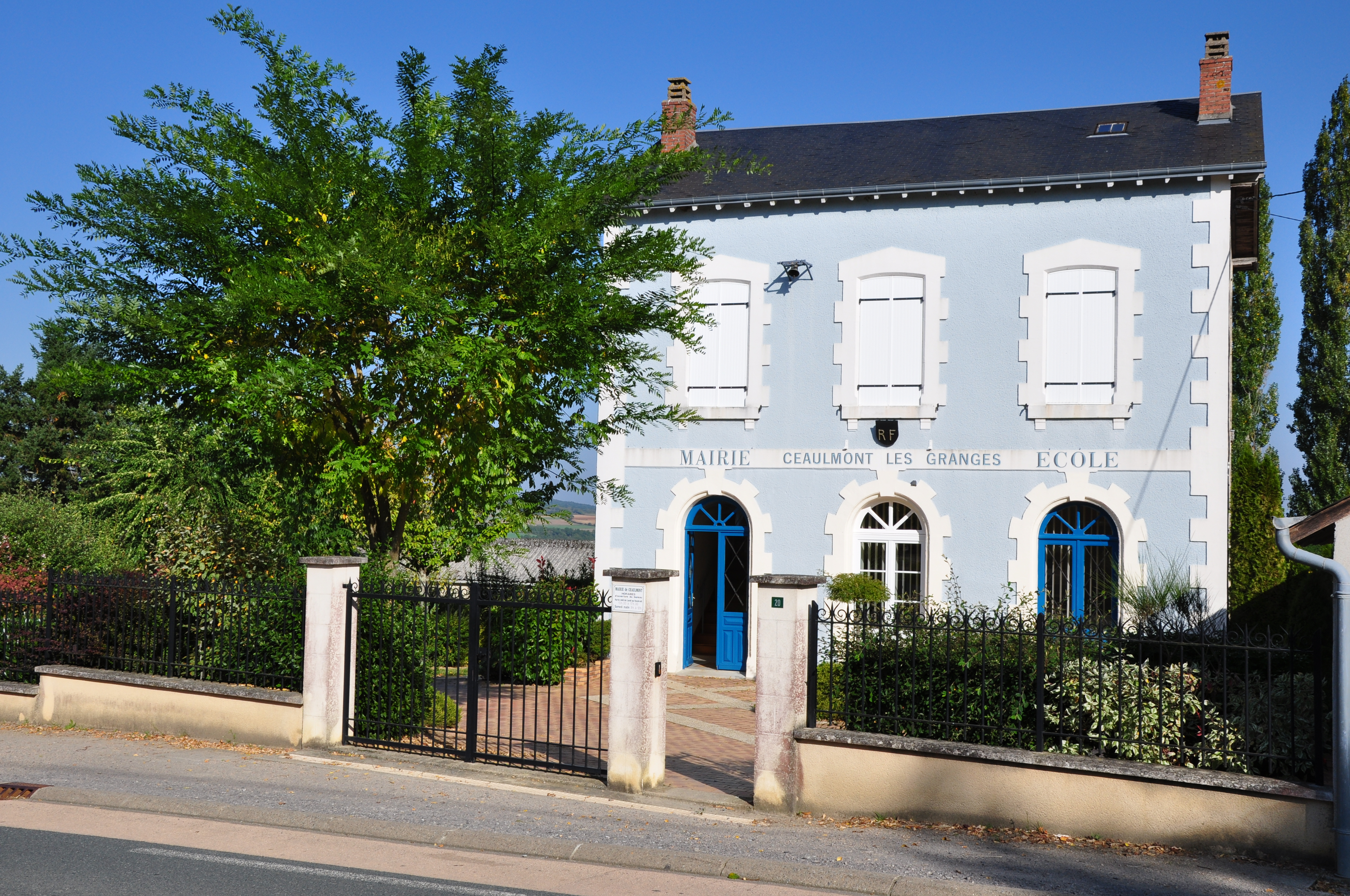 Mairie de Ceaulmont (Indre)